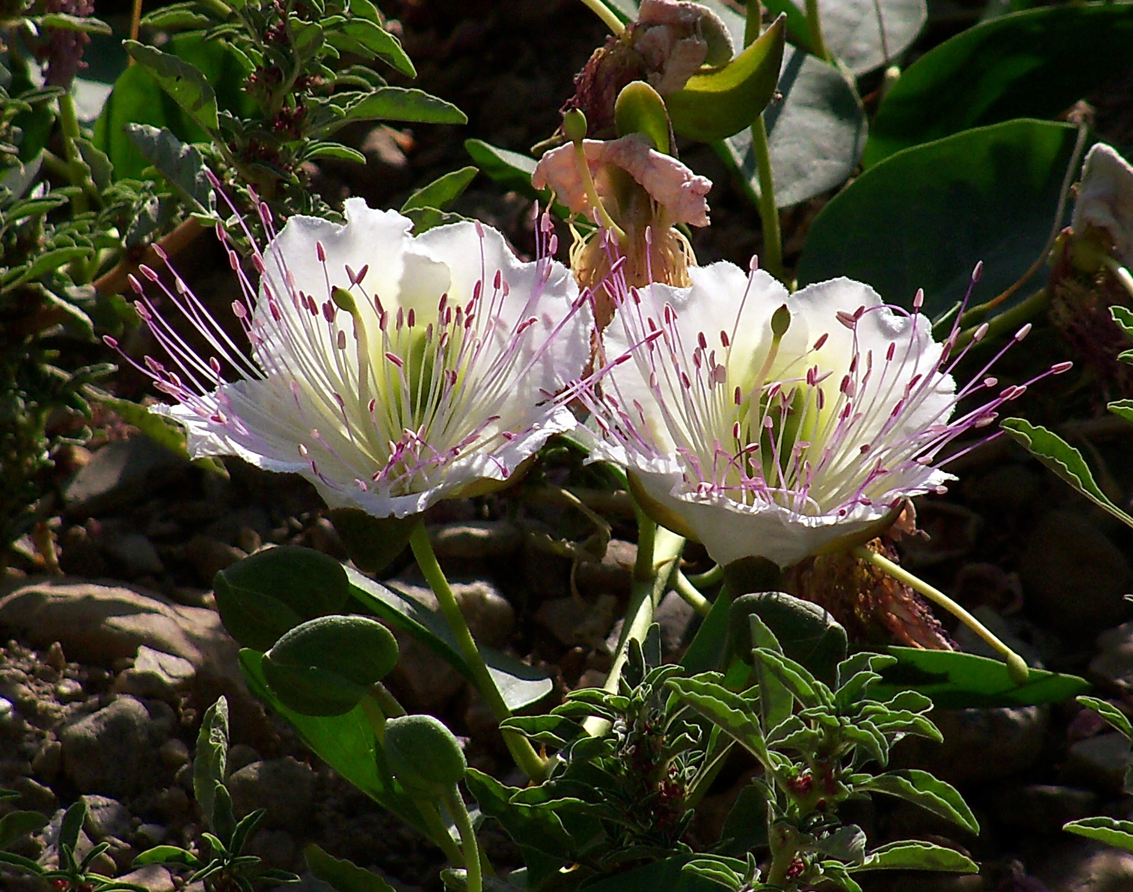 Capparis spinosa - Alcaparra, Tápena - Jardín de Agrucaper SA/Delicias , Águilas (Murcia, España).